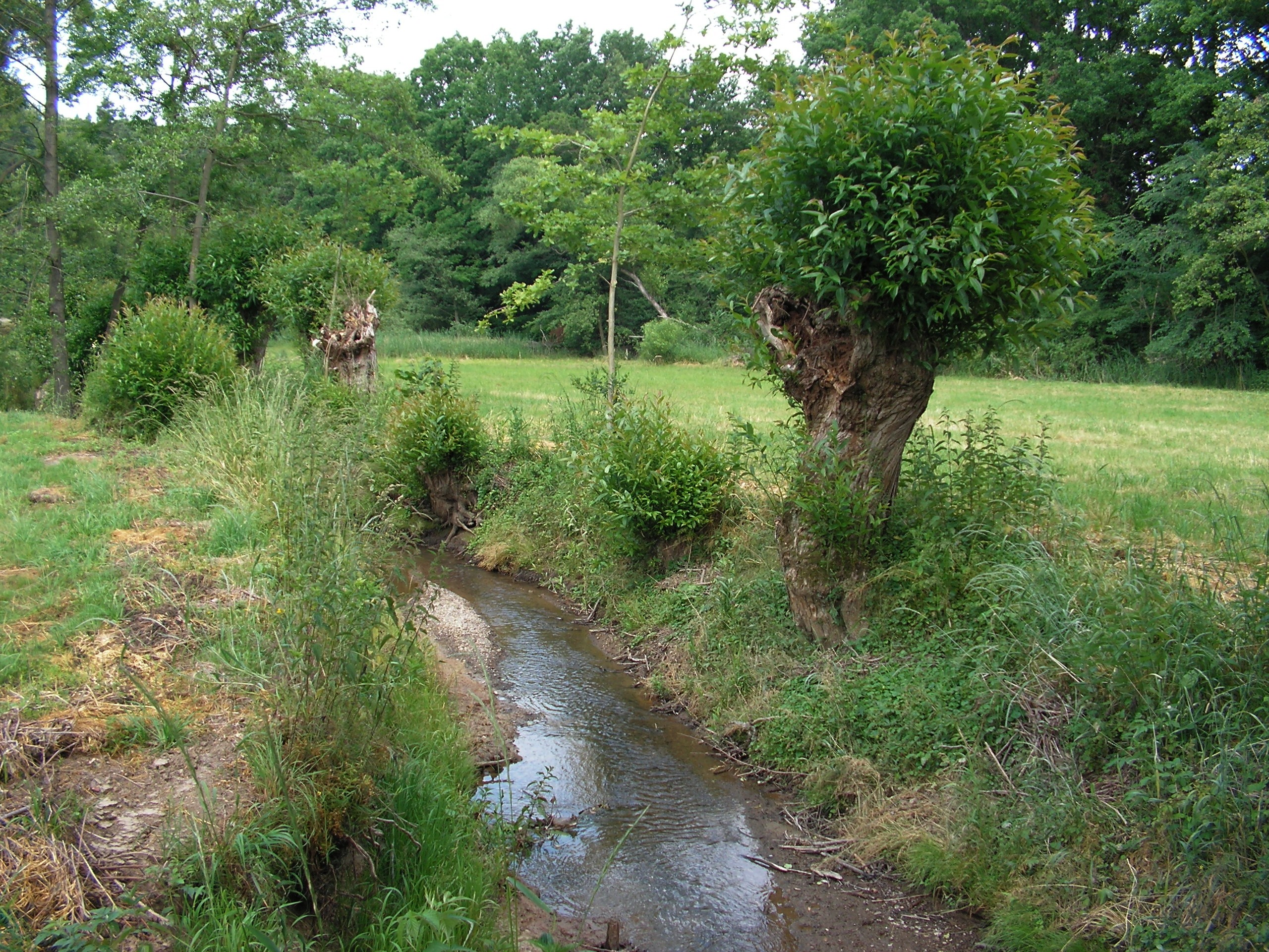 Opatovický potok nedaleko silnice spojující Týniště a Bykáň v okrese Kutná Hora